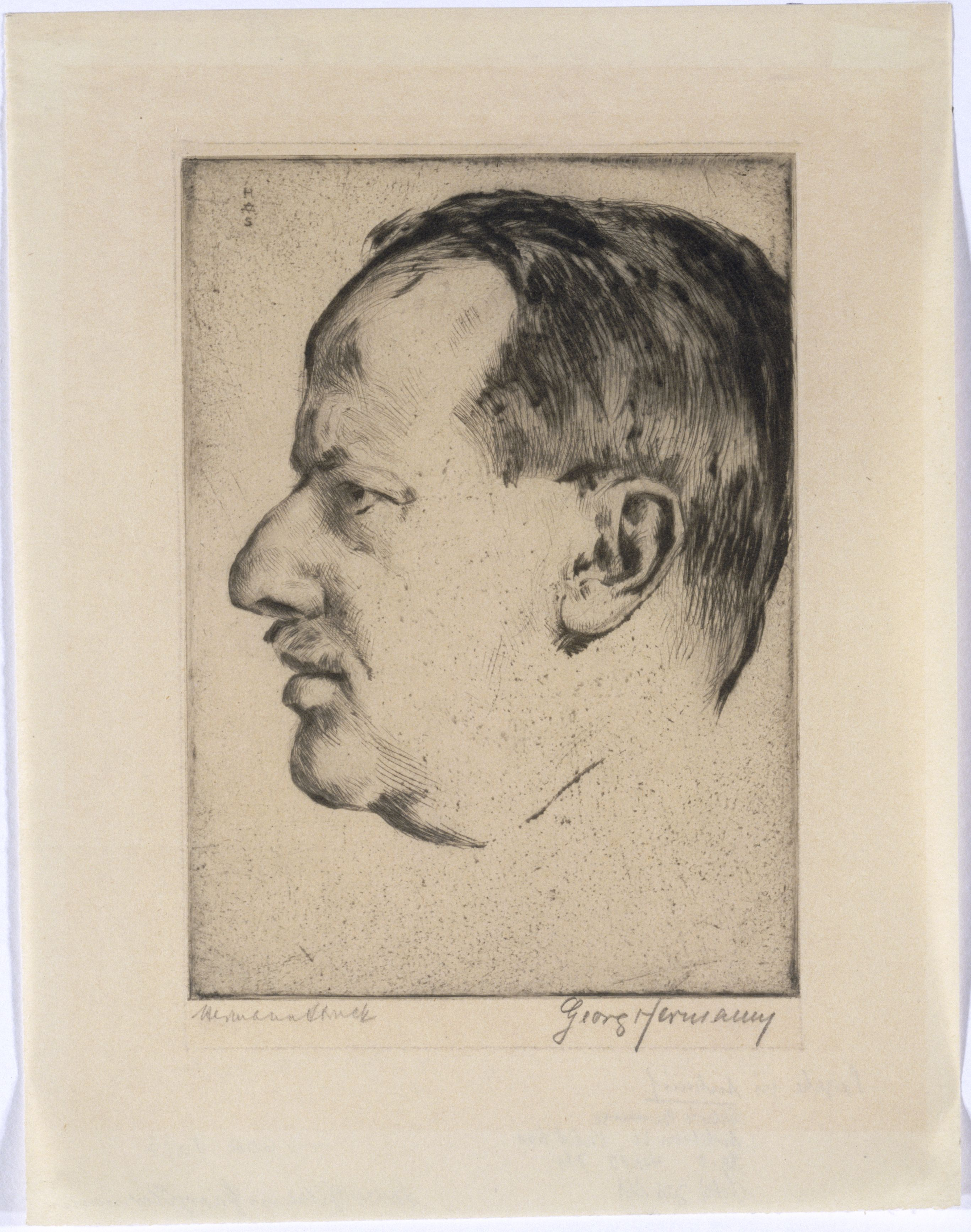 Artwork by Hermann Struck Dargestellte Person: Hermann, Georg (1871 - 1943), DNB-Link Datierung Display: ca. 1920 - 1930 Objektart: Radierung Schlagworte Inhalt /Geografie: Mann, Porträt Schlagworte Kontext: Schriftsteller